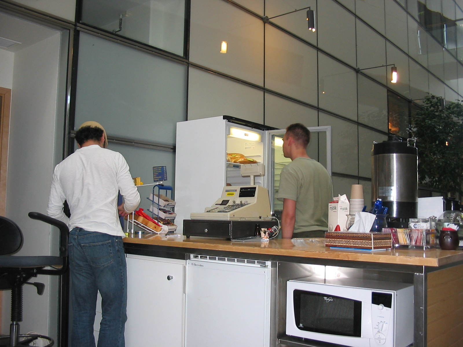 Zelfgemaakt met een digitale camera.